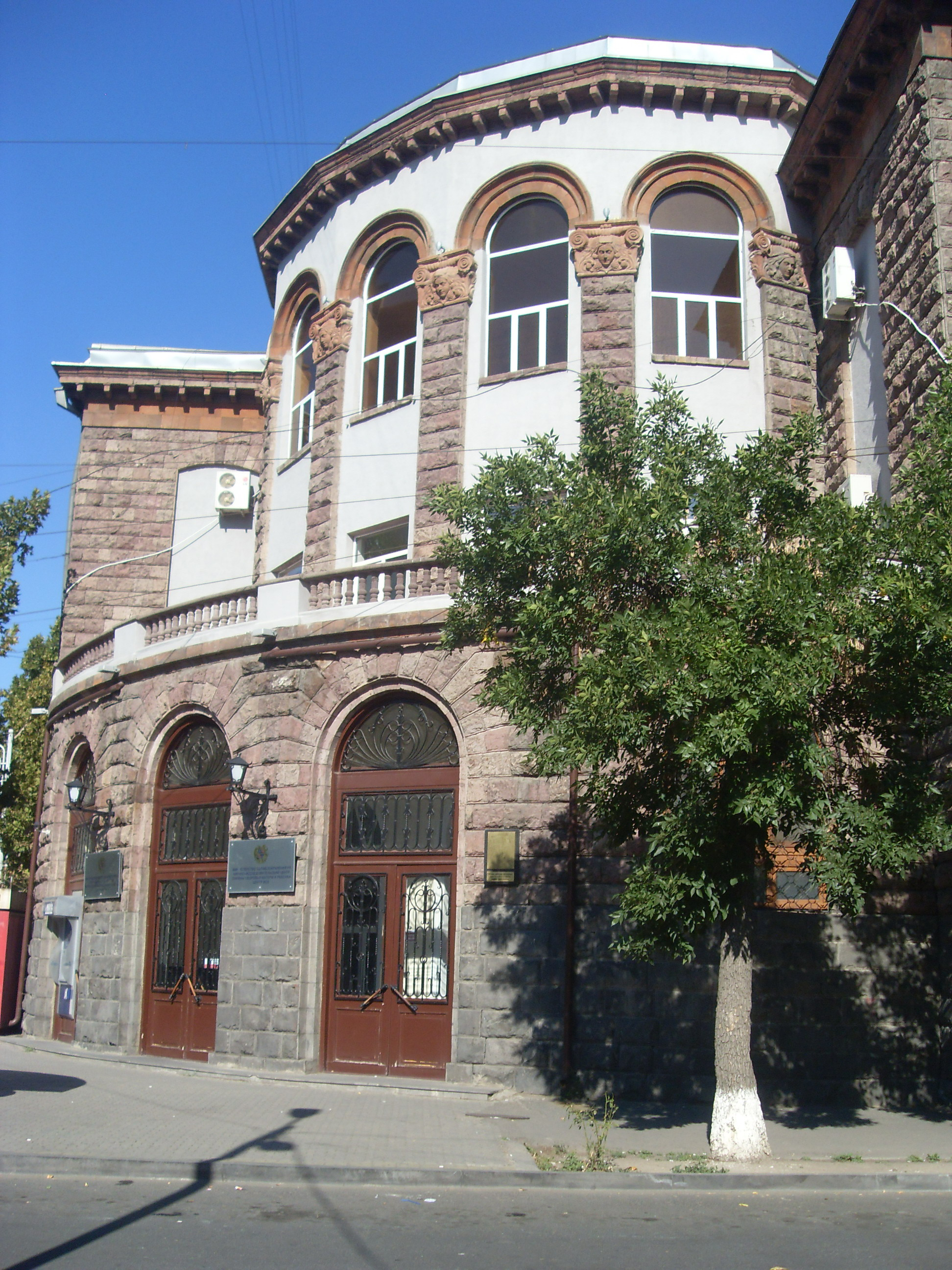 Ծննդատան շենք. Պարգև Մարգարյանի անվան Մոր և մանկան առողջության պահպանման հայկական գիտահետազոտական կենտրոն, 1931 թ.. 1936-1939 թթ., Երևան, ճարտ.` Մ. Գրիգորյան, Ն. Բունիաթյան 6/82